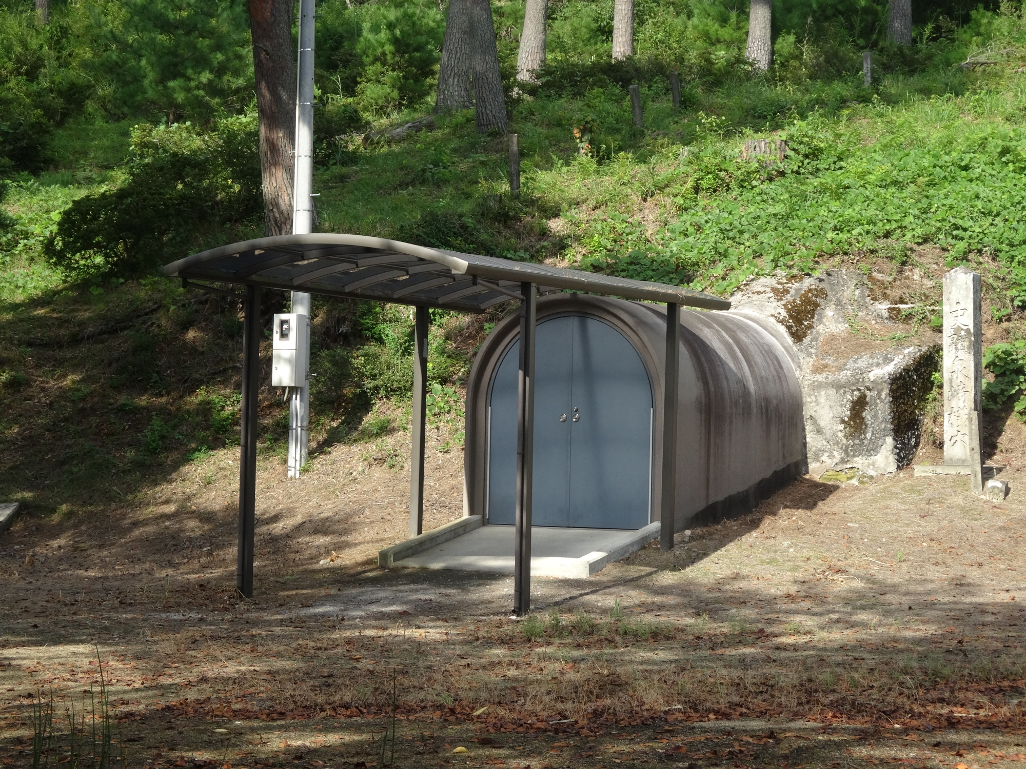 泉崎横穴（福島県西白河郡泉崎村）